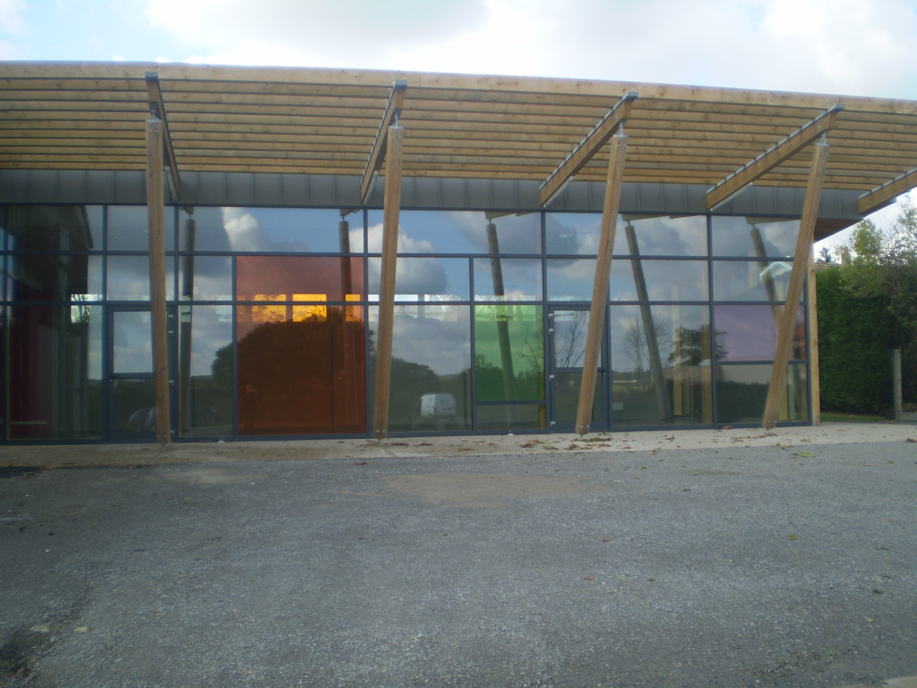 médiathèque place Arthur Rimbaud